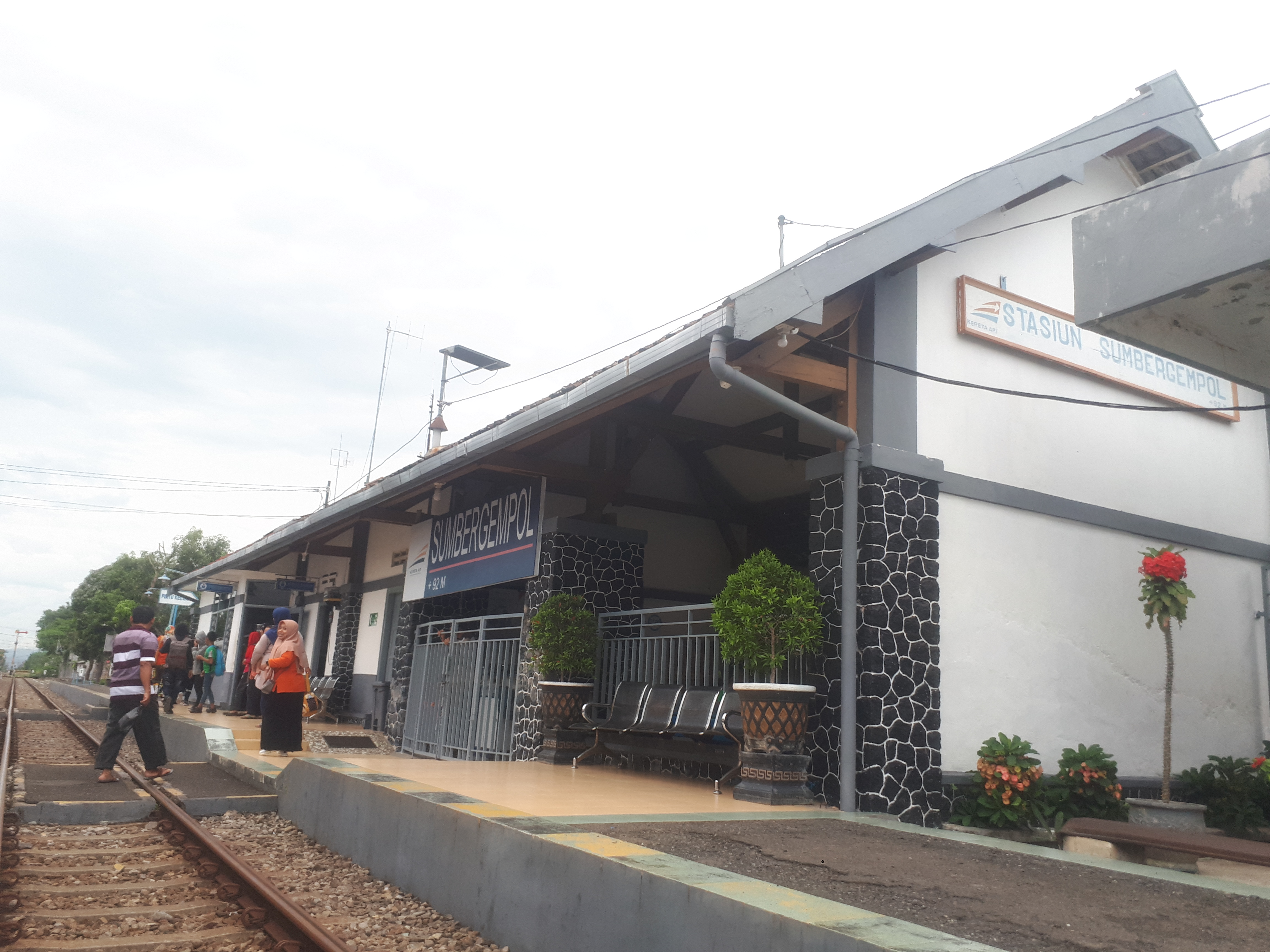 Stasiun Sumbergempol pada tahun 2020